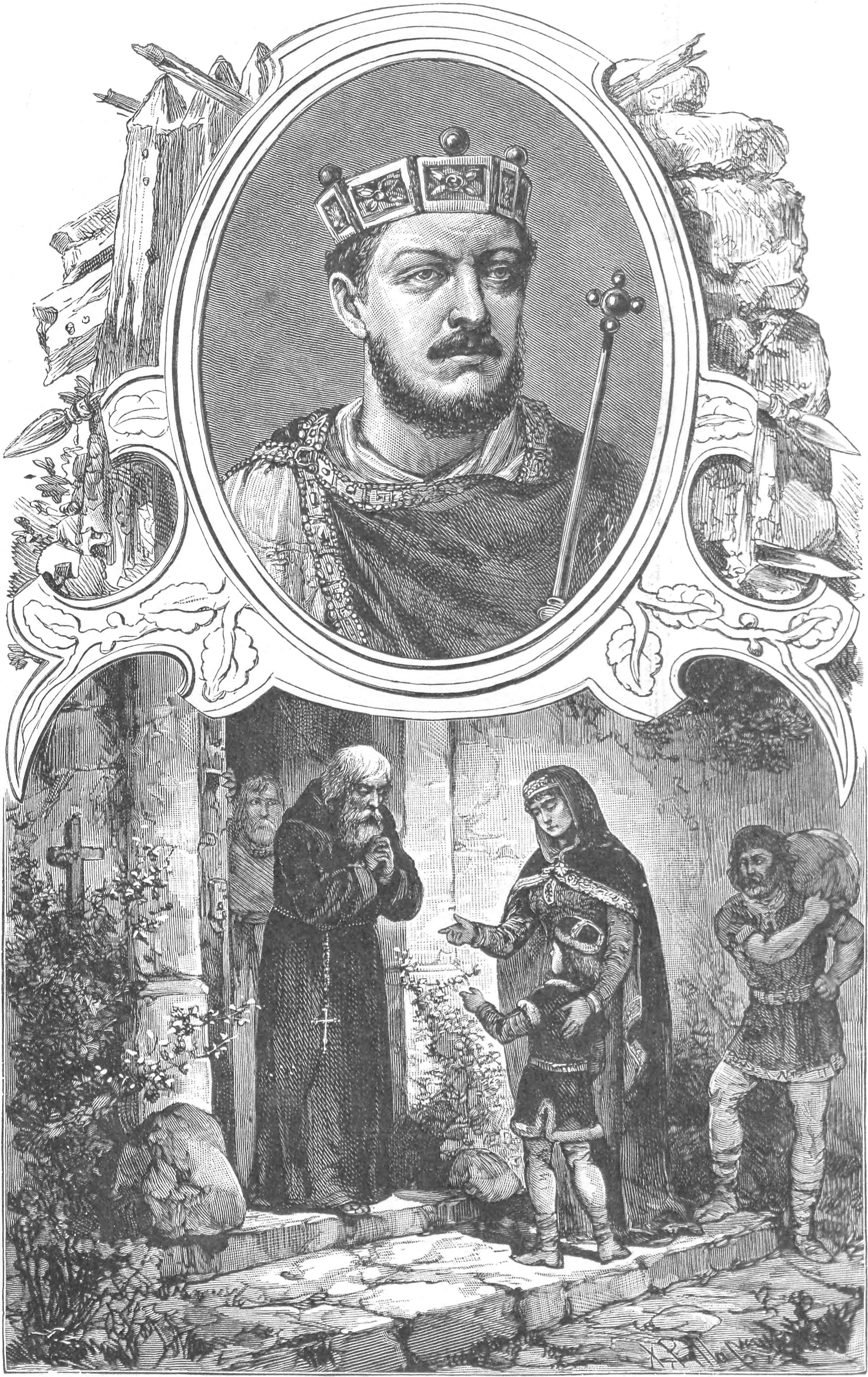 ilustracja z książki „Wizerunki książąt i królów polskich“